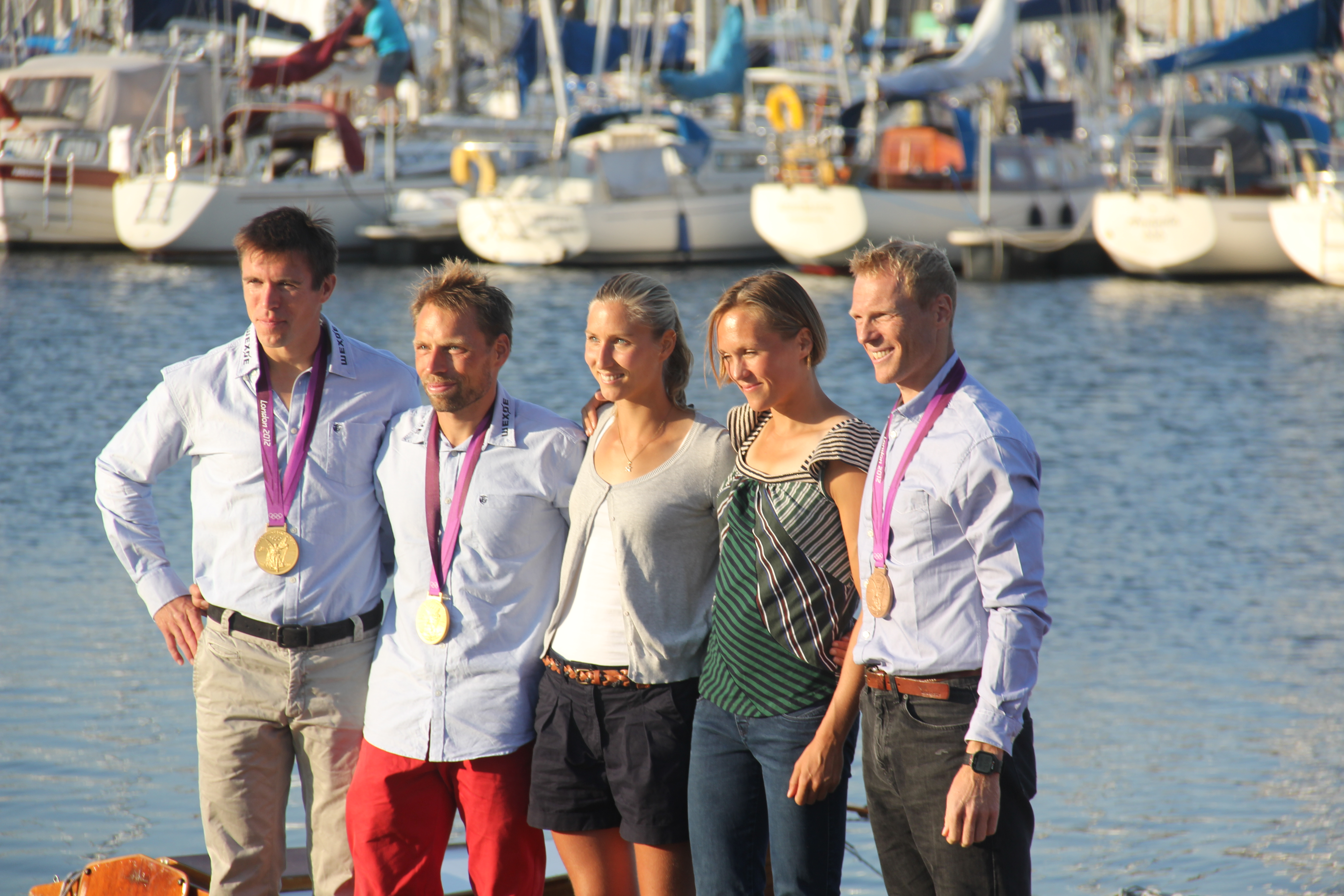 Danske OL 2012 roere på broen